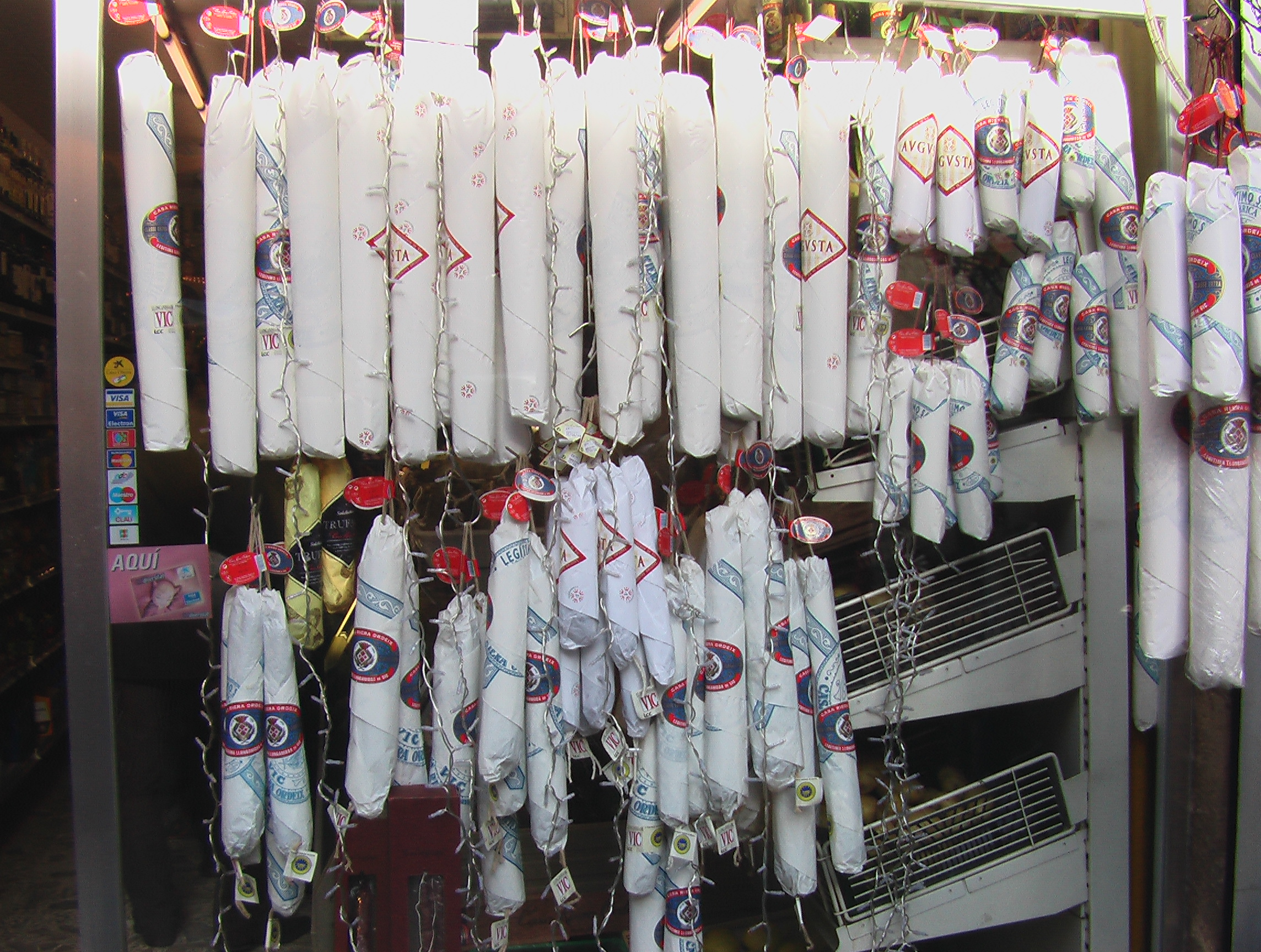 Foto de Llonganissa de Vic